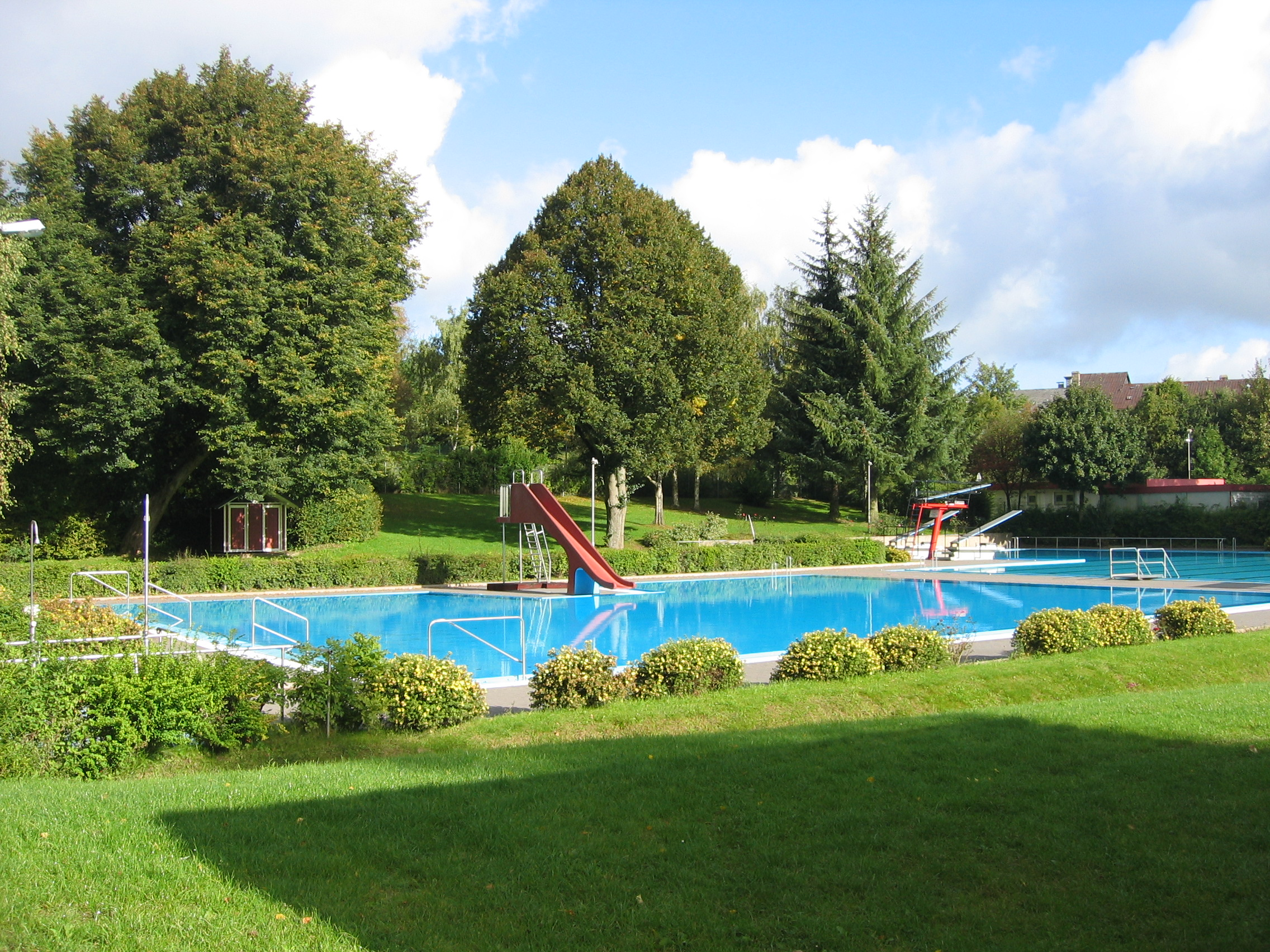 open-air bath Herscheid